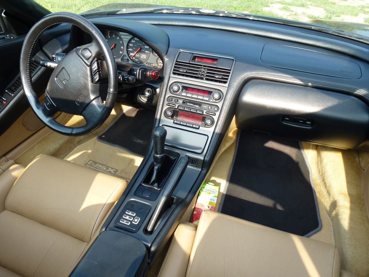 Wnętrze Hondy NSX